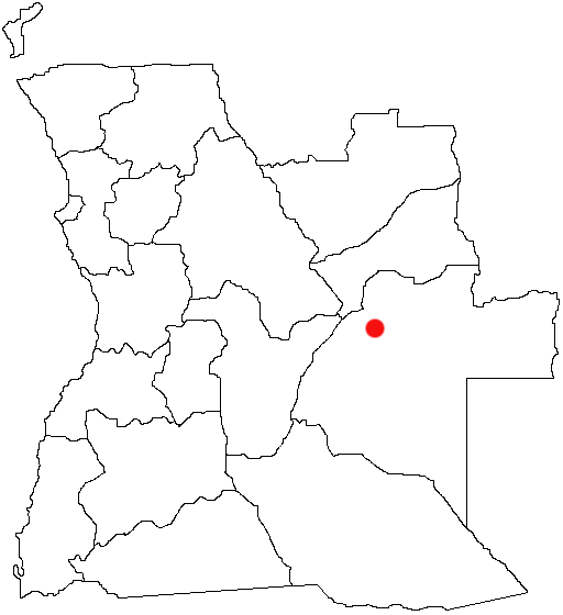 Luena, Angola location map